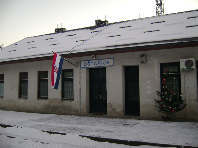 Kolodvor Oštarije,mjesto na kojem počinje Lička pruga